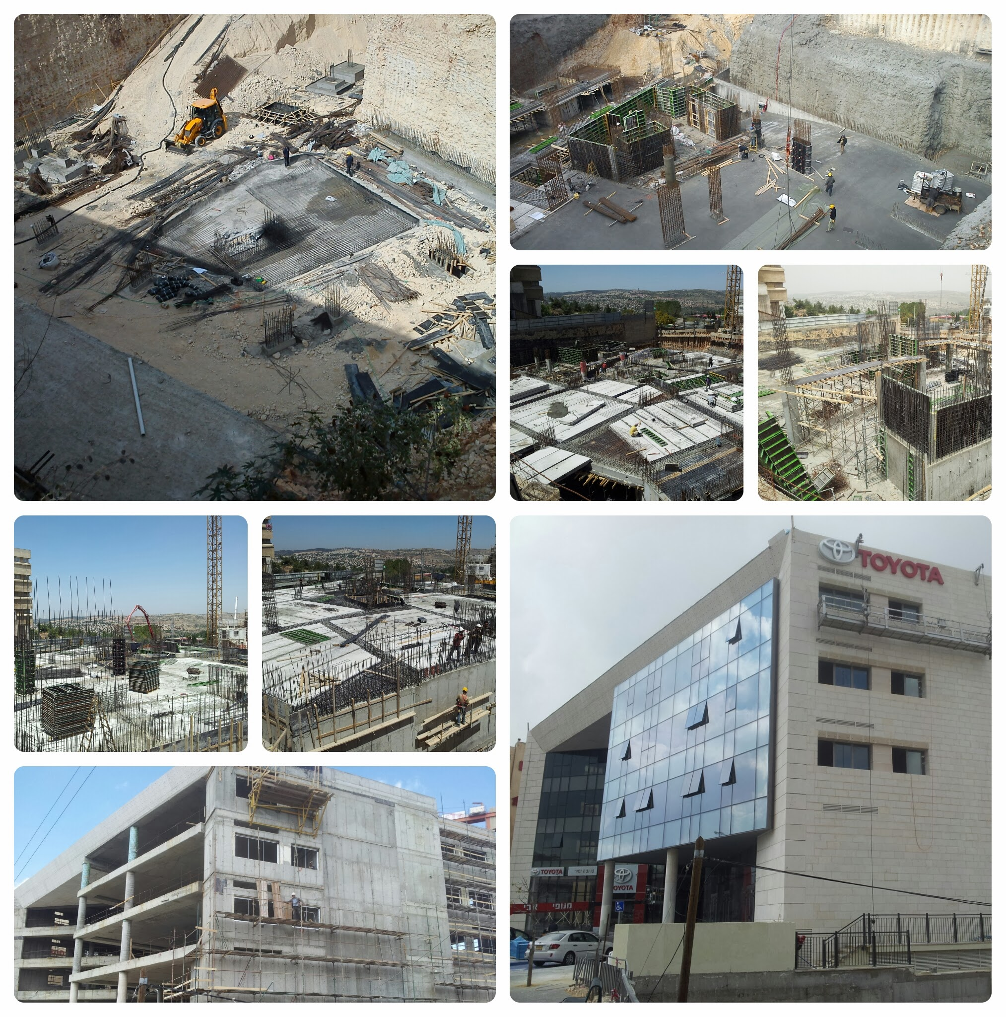 תהליכי הבנייה של בית טויוטה בירושלים